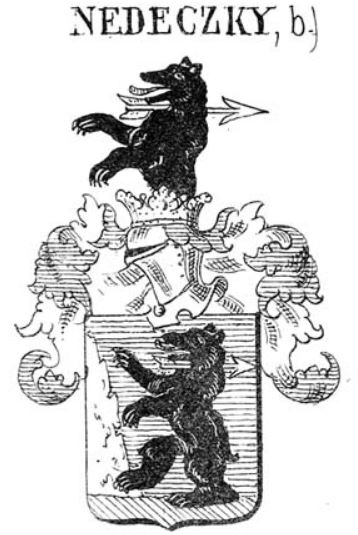 A nedeczei Nedeczky család cimere (Siebmacher féle könyvéből)